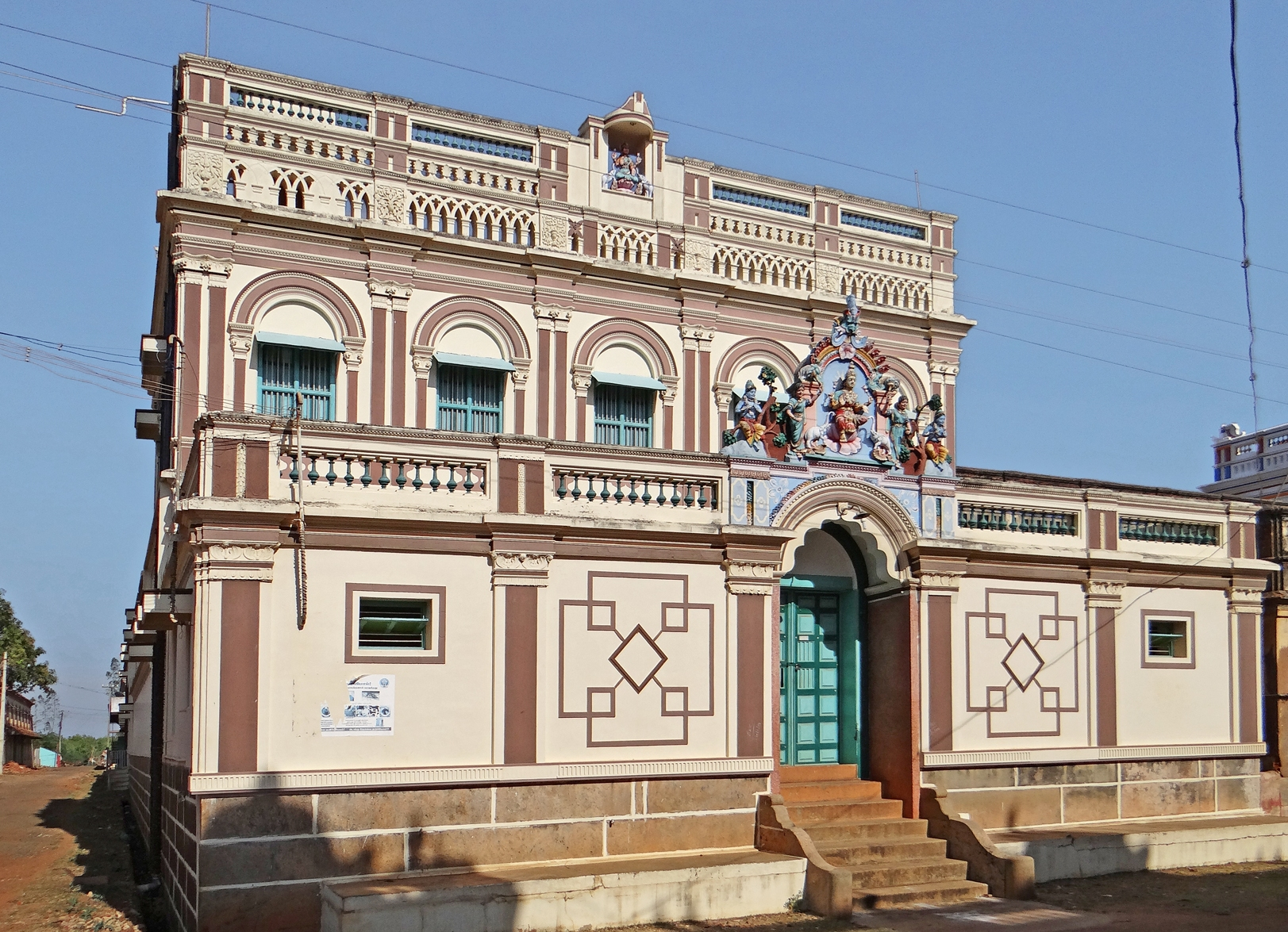 La petite ville de Kanadukathan se trouve dans le Chettinad, une région où s'est développée, depuis l'époque des Chola(s), la communauté des Chettiars. Les Chettiars appartiennent à une caste de commerçants qui se sont enrichis dans la banque et dans diverses activités lucratives, durant l'occupation britannique, notamment en Birmanie et à Ceylan. Ils ont fait construire des maisons très luxueuses dans leur région d'origine comme à Kanadukathan mais n'y habitent plus depuis longtemps, ce qui donne à cette petite ville une ambiance étrange de ville déserte. Les palais construits dans un style éclectique, se ressemblent tous au niveau architectural, ils ont été peints de couleurs criardes différentes pour se différencier les uns des autres. Tous comportent sur leur façade un "kudu" (motif décoratif en fer à cheval) consacré à la déesse de la richesse Laksmi, la parèdre de Vishnou. Parmi ces palais conformes à l'image de réussite sociale que leurs propriétaires voulaient donner, se trouvent quelques petits bâtiments de style art déco plus intéressants mais pas toujours entretenus. Article de Wikipedia sur le Chettinad, pays des Chettiars